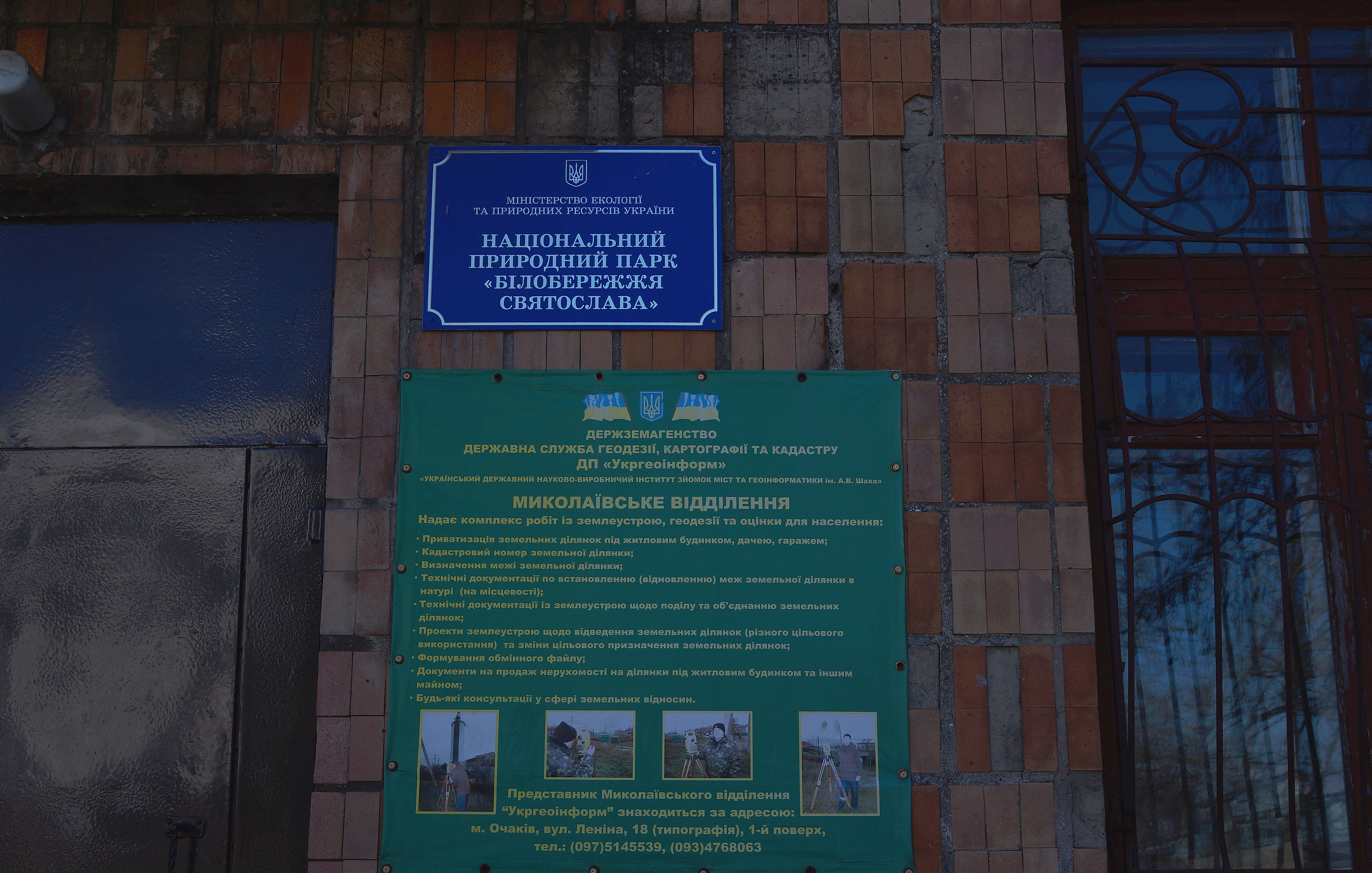 Національний природний парк «Білобережжя Святослава», Очаківський, Березанський р-ни